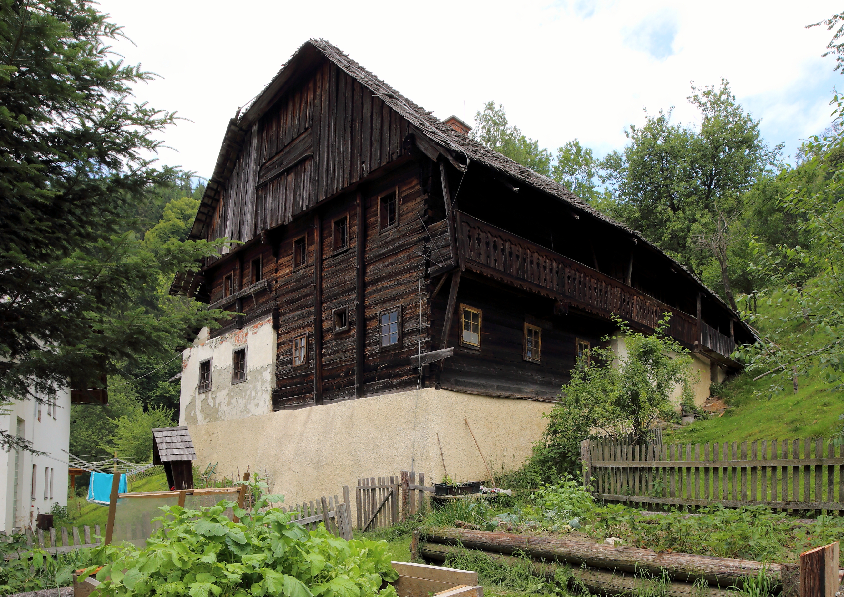 Denkmalgeschützter Bauernhof an Adresse Brandstatt 29 in der österreichischen Gemeinde Stanz im Mürztal im steirischen Bezirk Bruck-Mürzzuschlag.